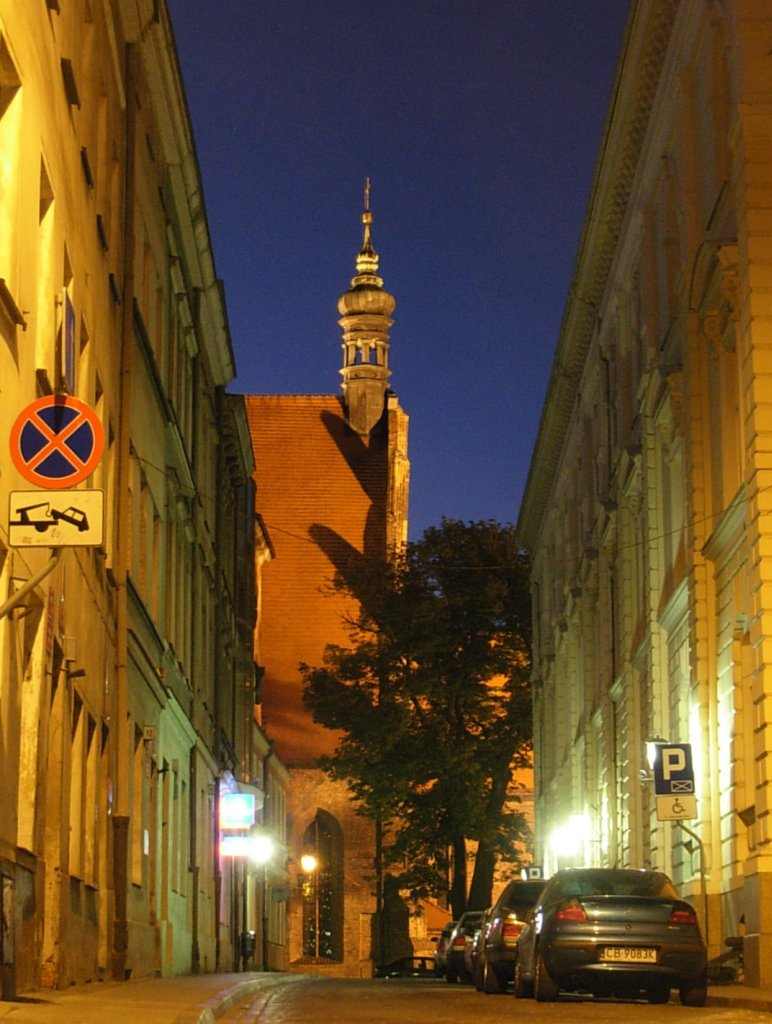 Ulica Jezuicka w Bydgoszczy